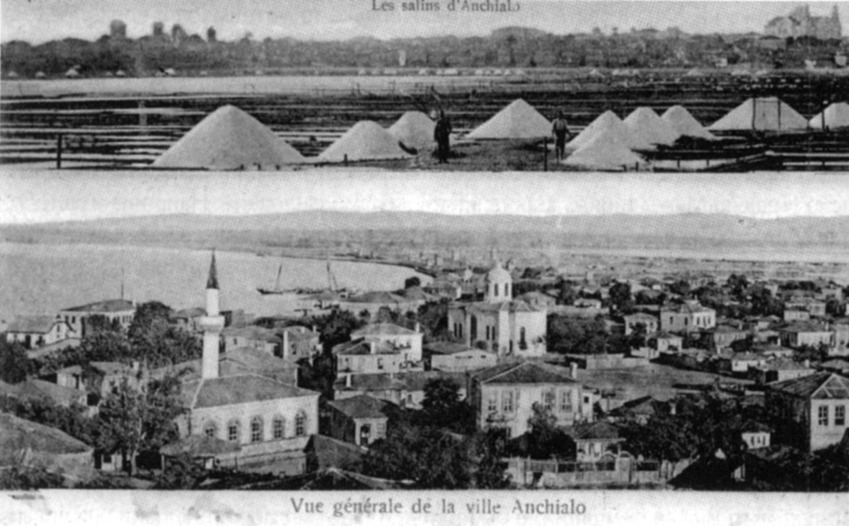 Картичка от Анхиало в началото на 20 век: общ вид (долу) и солниците (горе)